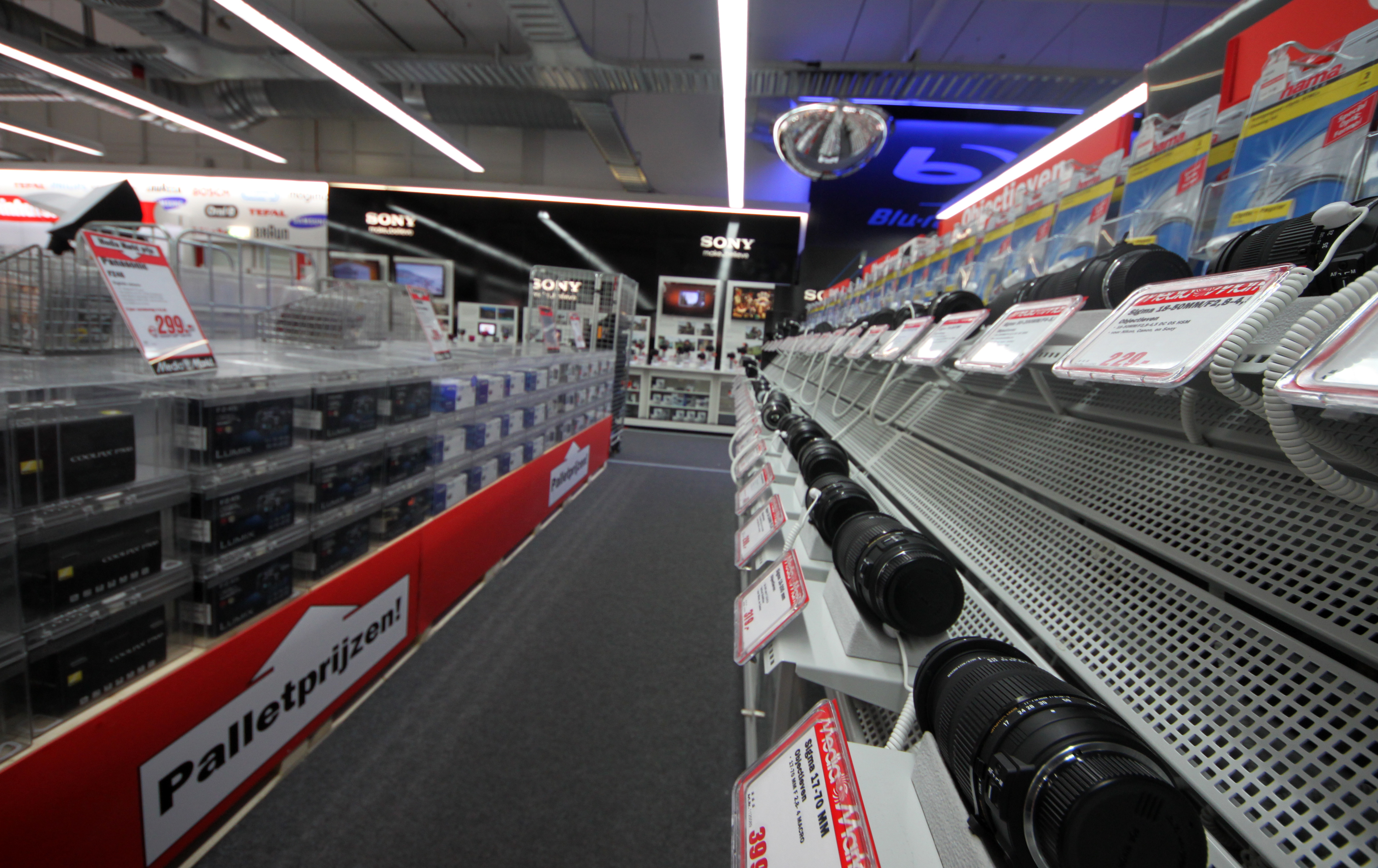 Stellage met cameralenzen in de Mediamarkt Amsterdam Bijlmer Arena.